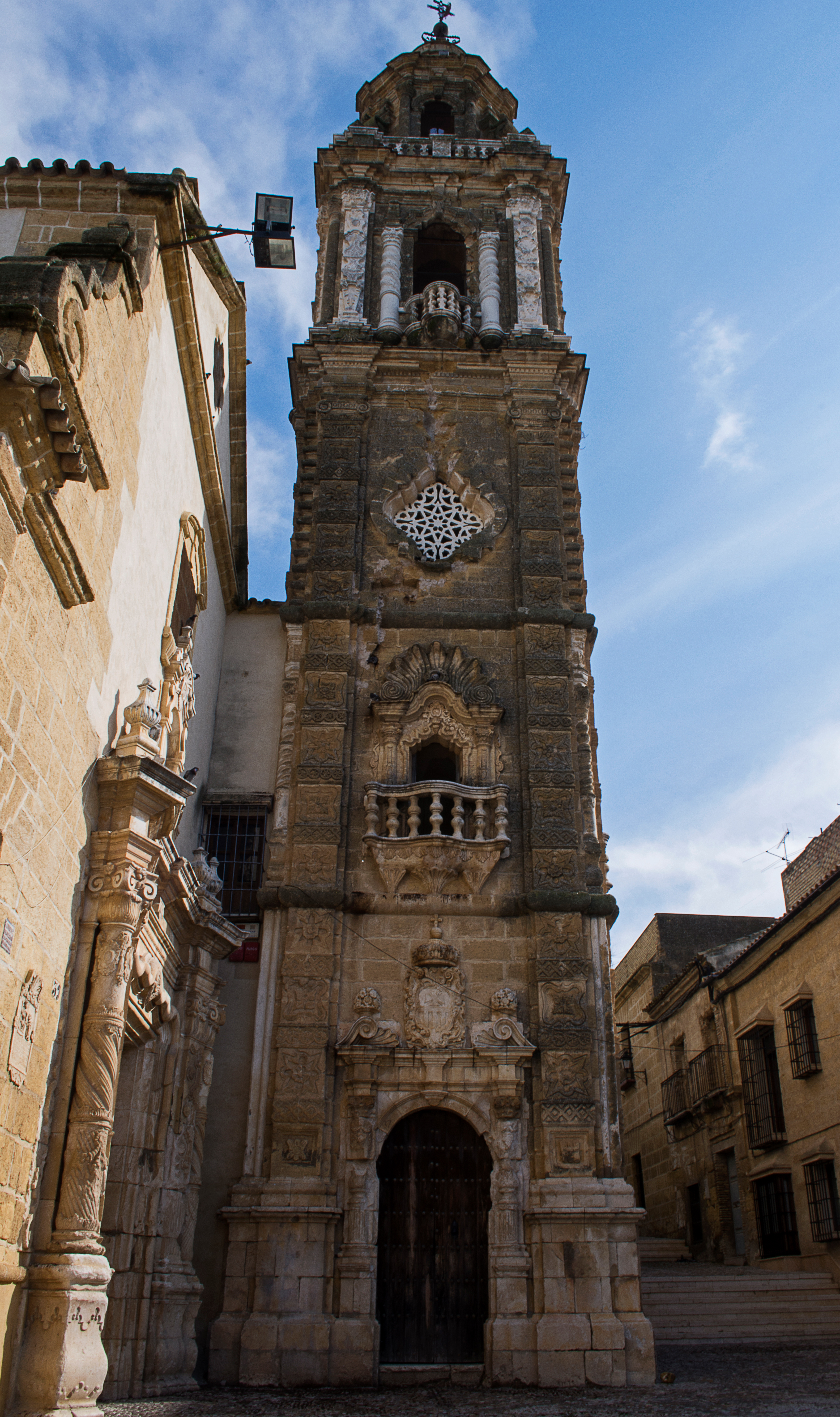 Antiguo Convento de la Merced (Osuna, provincia de Sevilla).